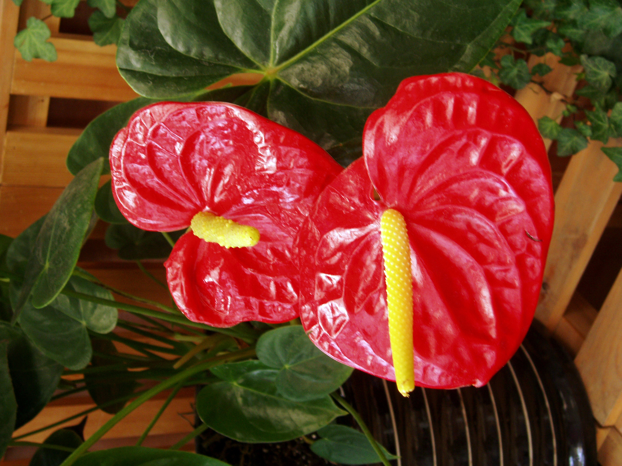 Flamingo lilies